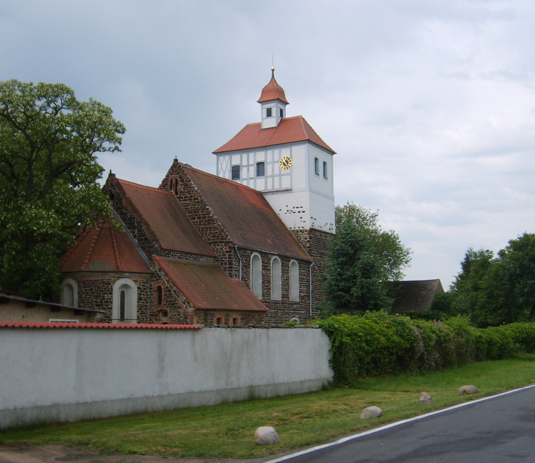 Friedersdorf bei Rückersdorf